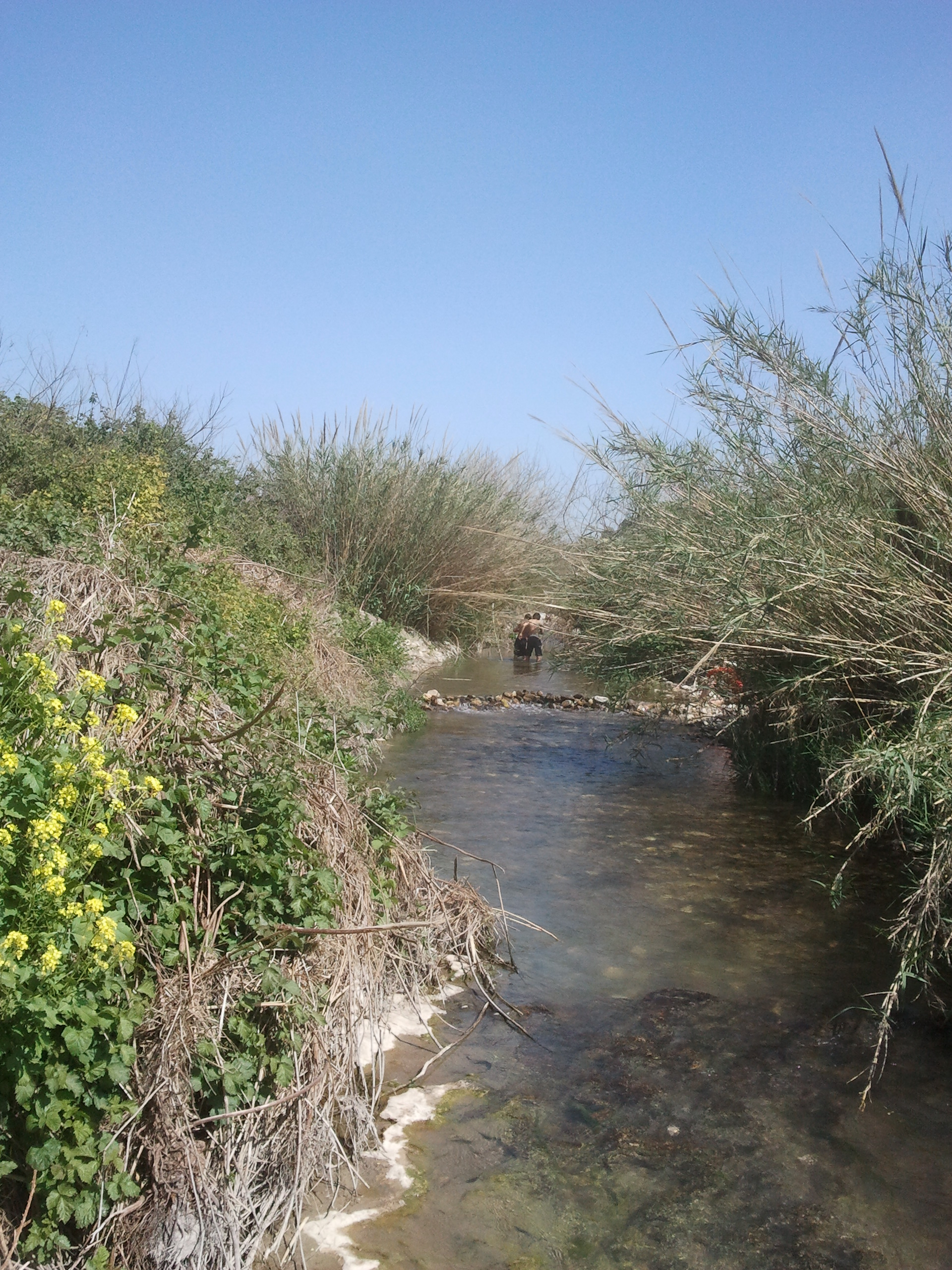 נחל תנינים בזרימתו ליד המושב עמיקם, לאורך הנחל ישנן התרחבויות קלות היוצרות בריכות קטנות המאפשרות רחצה